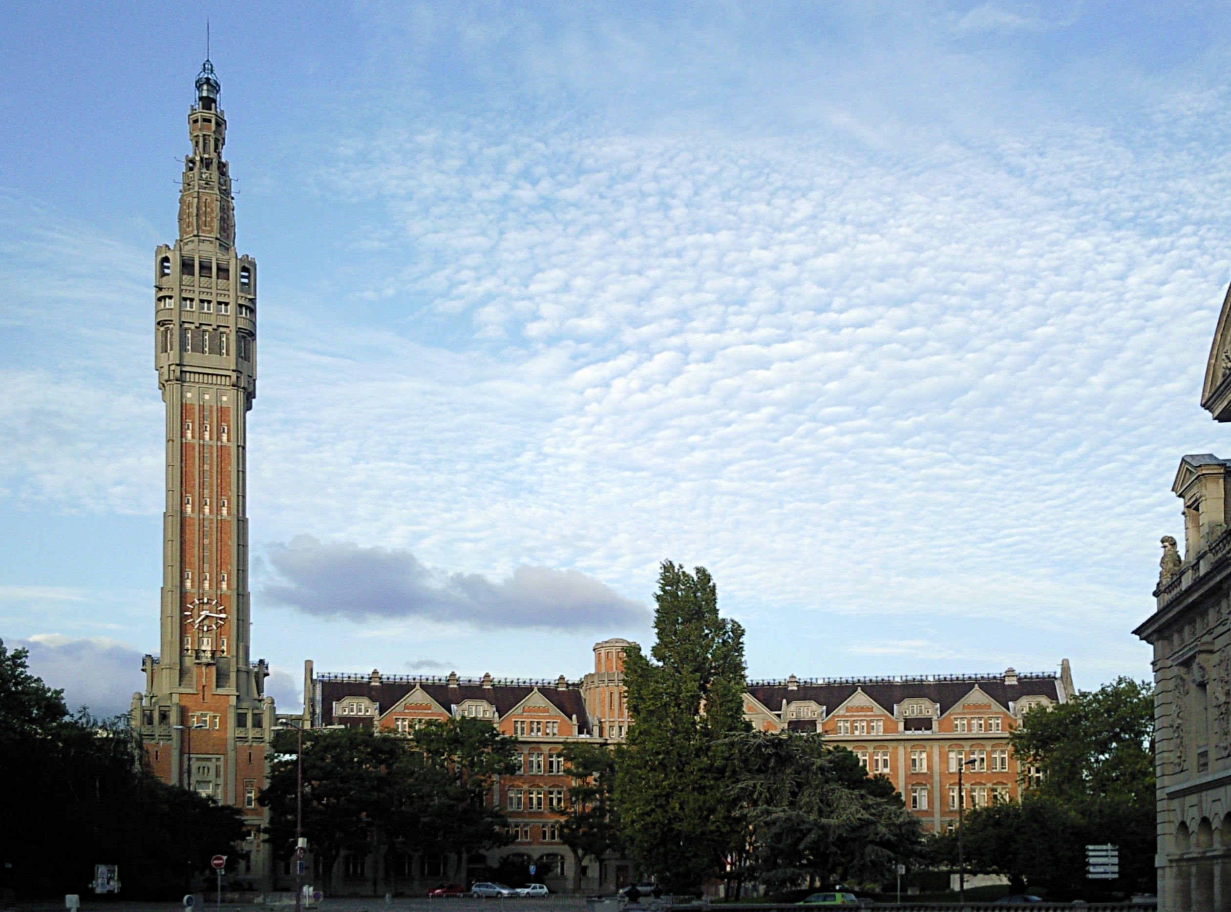 Vue depuis la porte de Paris de l'Hotel de ville de Lille (Nord).